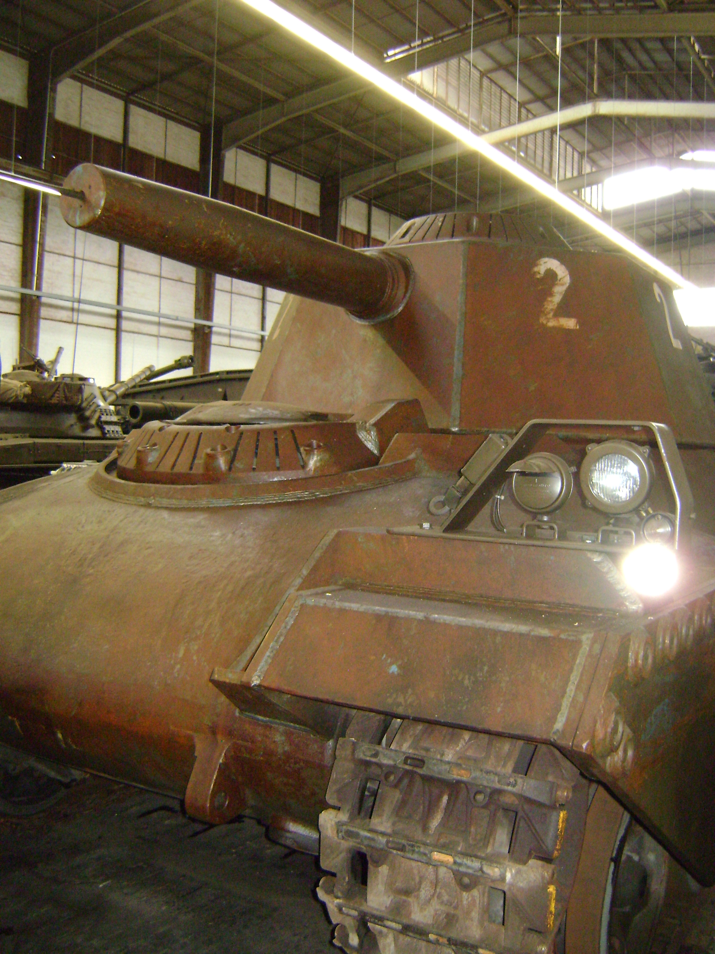 Zielpanzer front